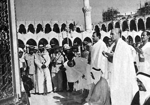 شاه و اردشير زاهدي در سفر حج